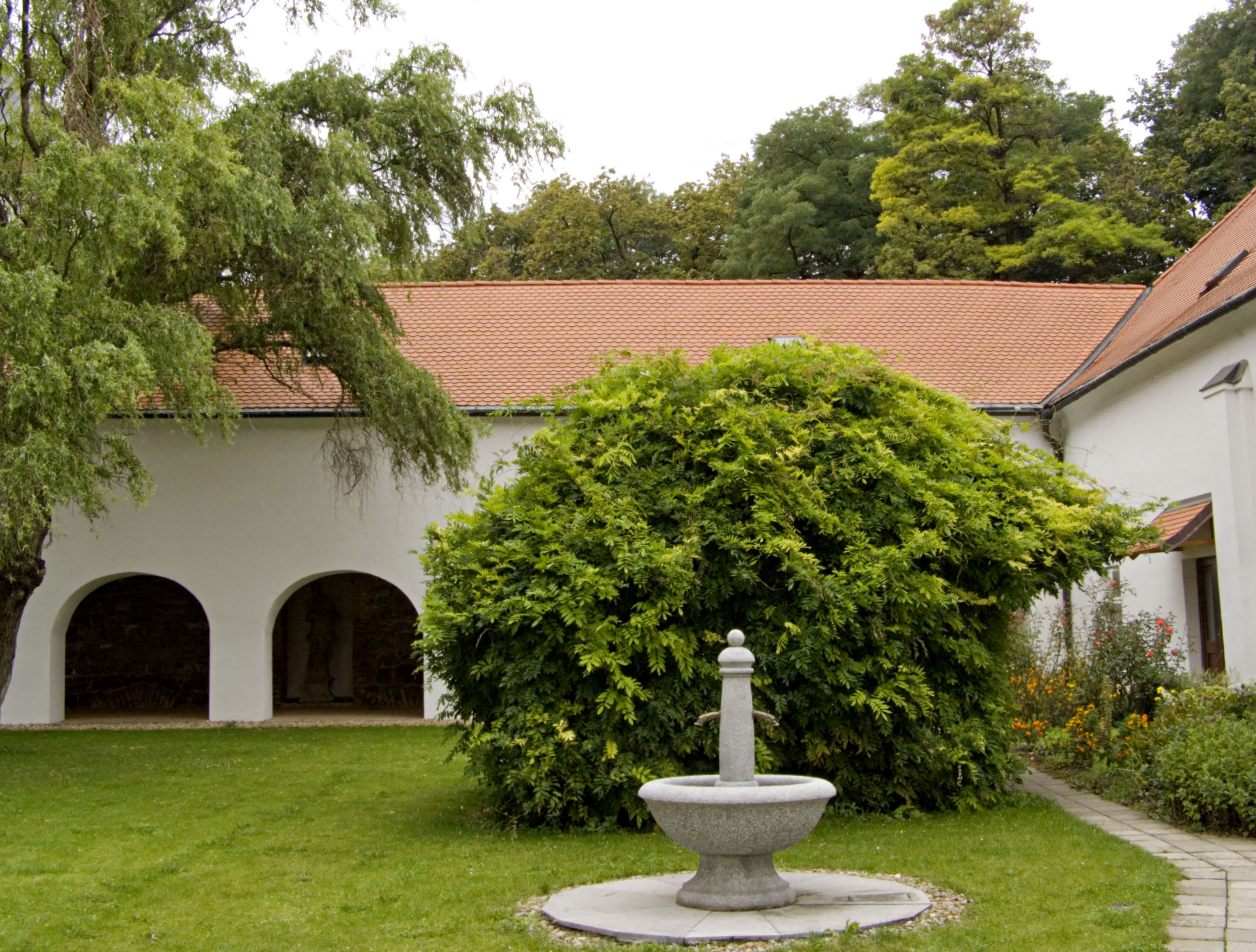 Brno, Bazilika Nanebevzetí Panny Marie